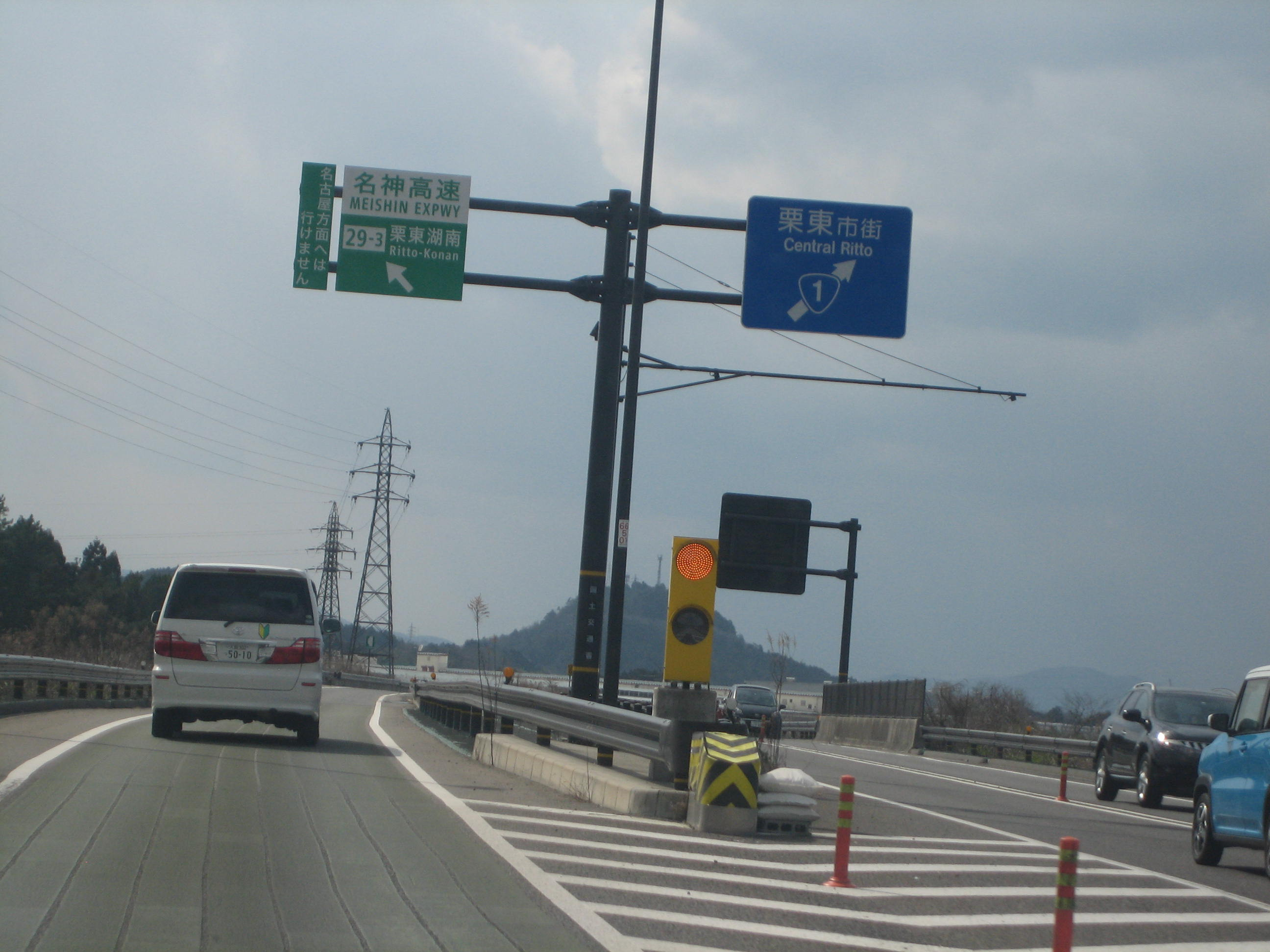 名神高速道路 栗東湖南IC